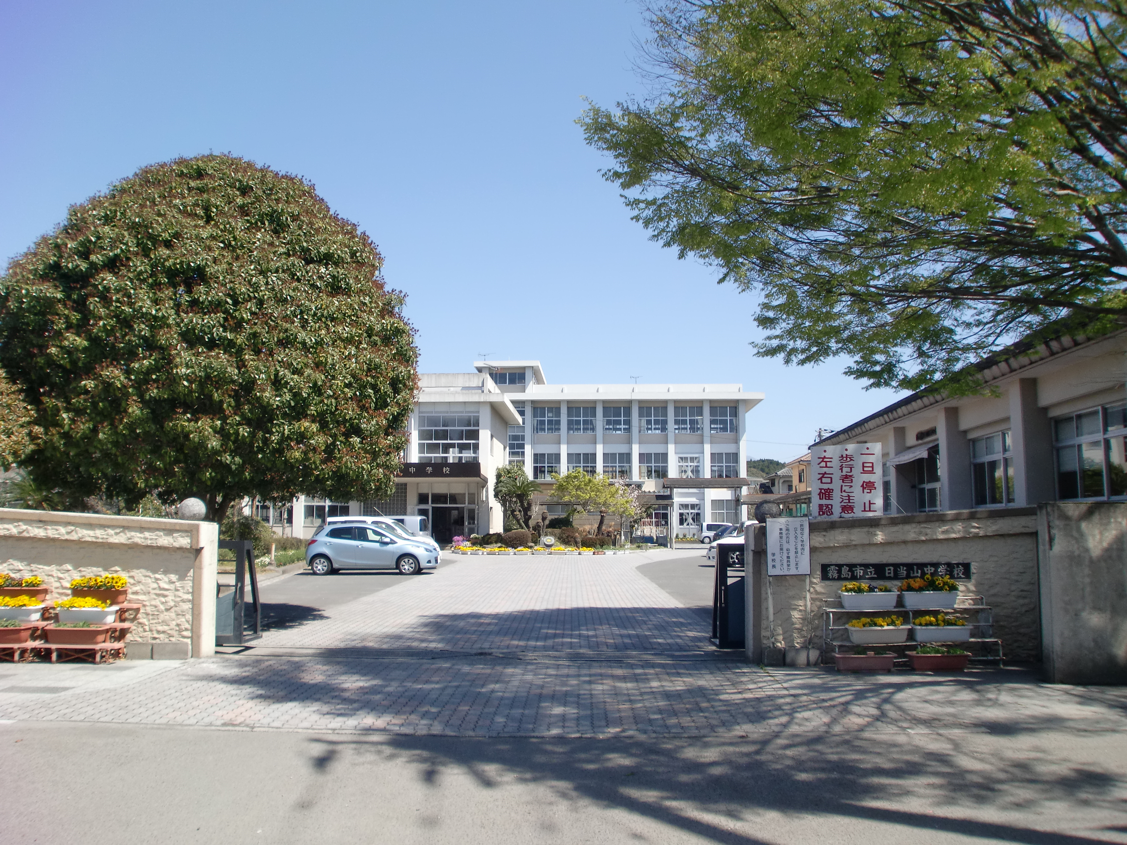 霧島市立日当山中学校の外観。